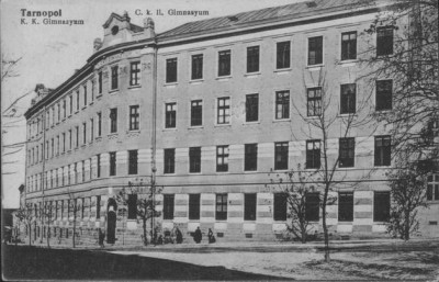 II Gimnazjum im. Juliusza Słowackiego w Tarnopolu przy ul. Konarskiego 2 (dawniej św. Jana) na skrzyżowaniu z ul. Słowackiego.